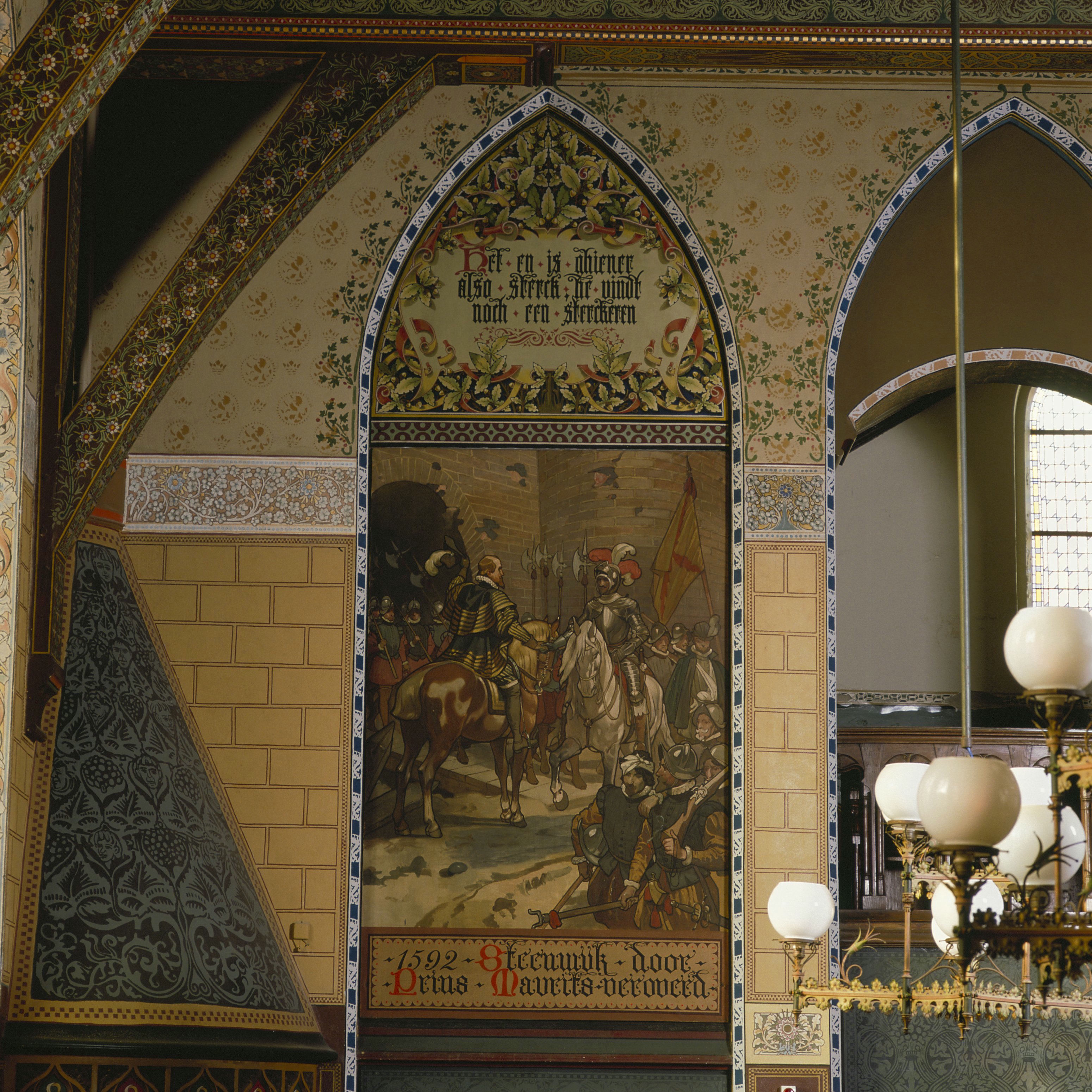 voormalig Provinciehuis: Interieur, eerste verdieping, achterzijde rechts (Statenzaal), muurschildering, 1592 Steenwijk door Prins Maurits veroverd (opmerking: Inventarisatie Decoratieve Interieurschilderingen in Nederland (1600-1940), i.s.m. RKD)